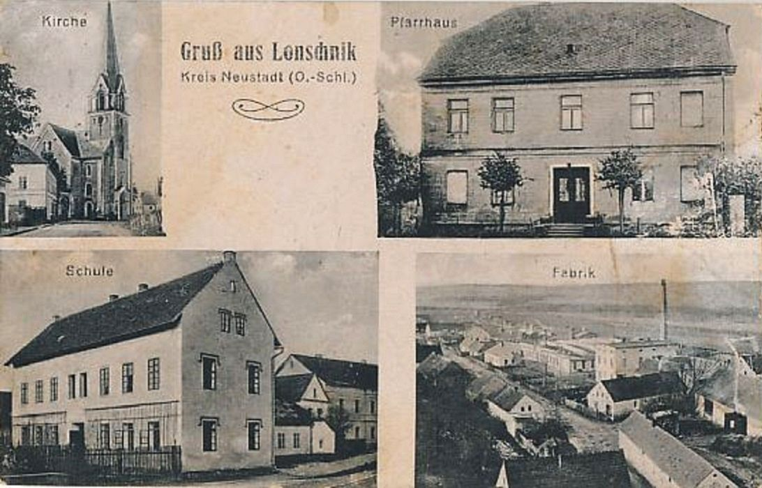 Gruss aus Lonschnik Kreis Neustadt (O.-Schl.) 1920